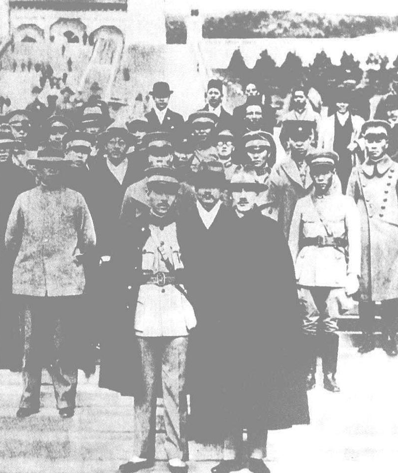 蒋介石与张学良在中山陵，摄于1930年代